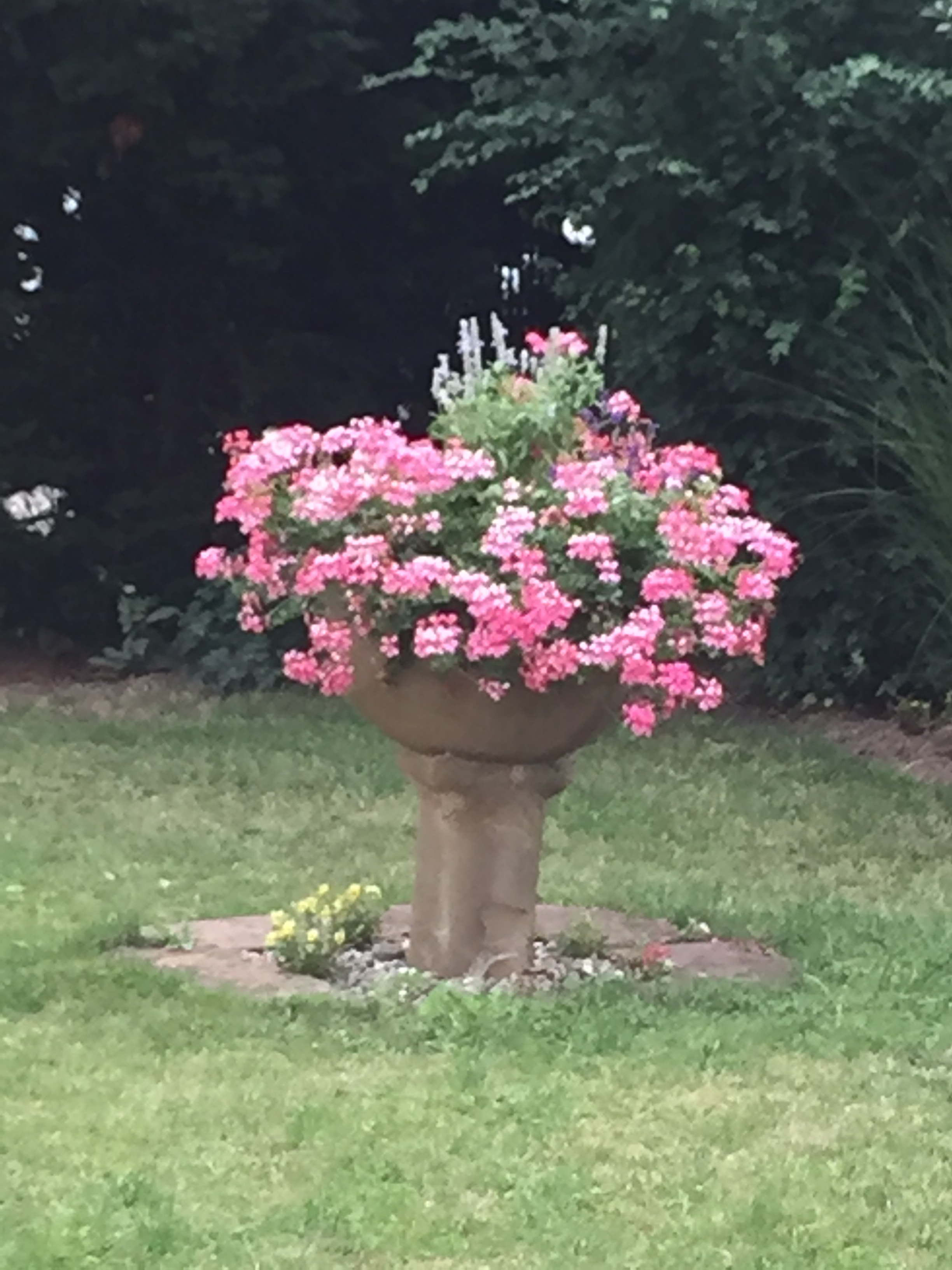 St. Bartholomäus (Kist)_altes Taufbecken, 17. Jahrhundert